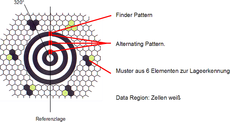 Strukturmerkmale der MaxiCodes